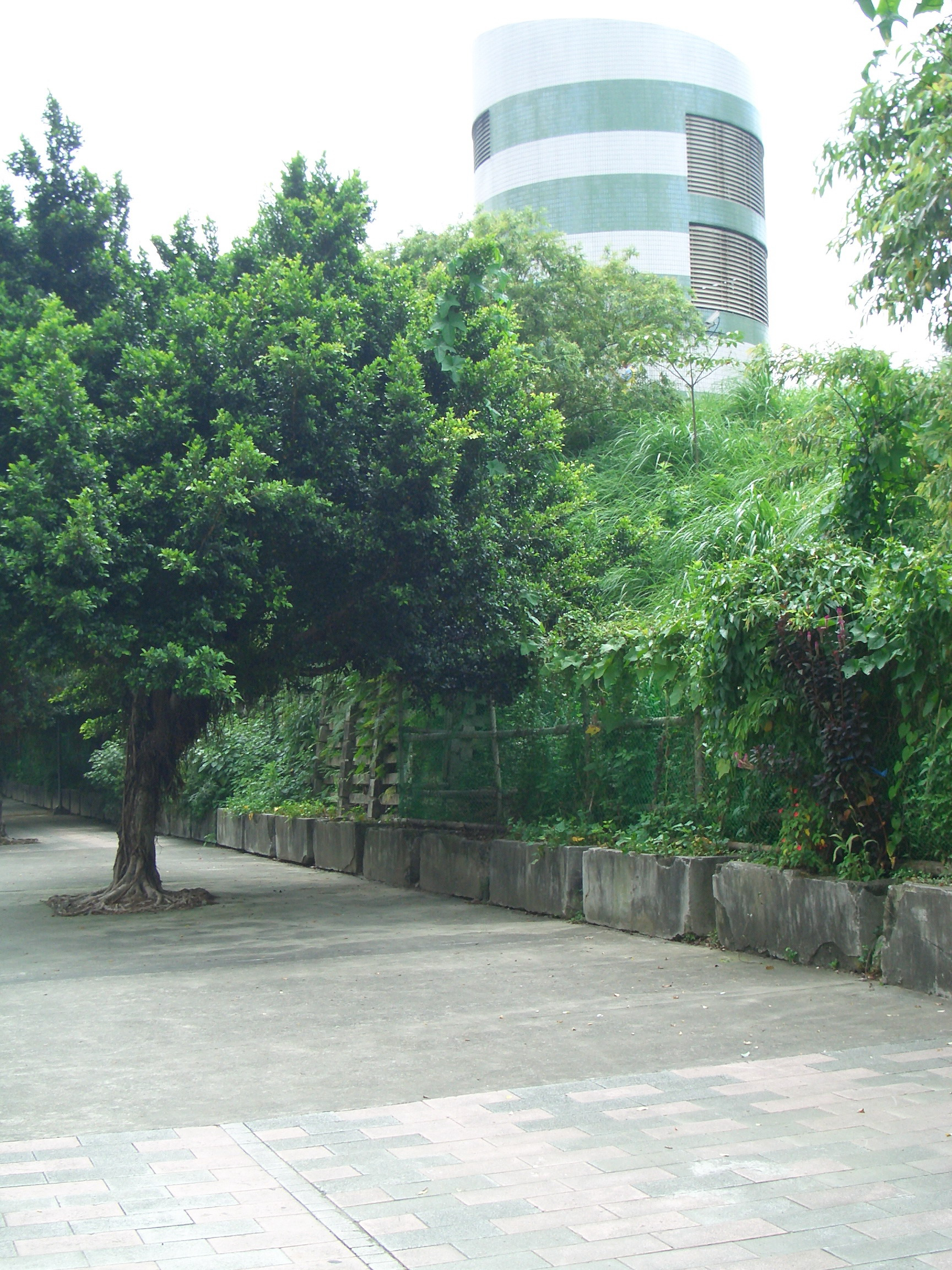 中文（台灣）: 臺北市戰前規劃的大型都會公園八號公園─兒童交通公園與臺北捷運橘線河底隧道通風口